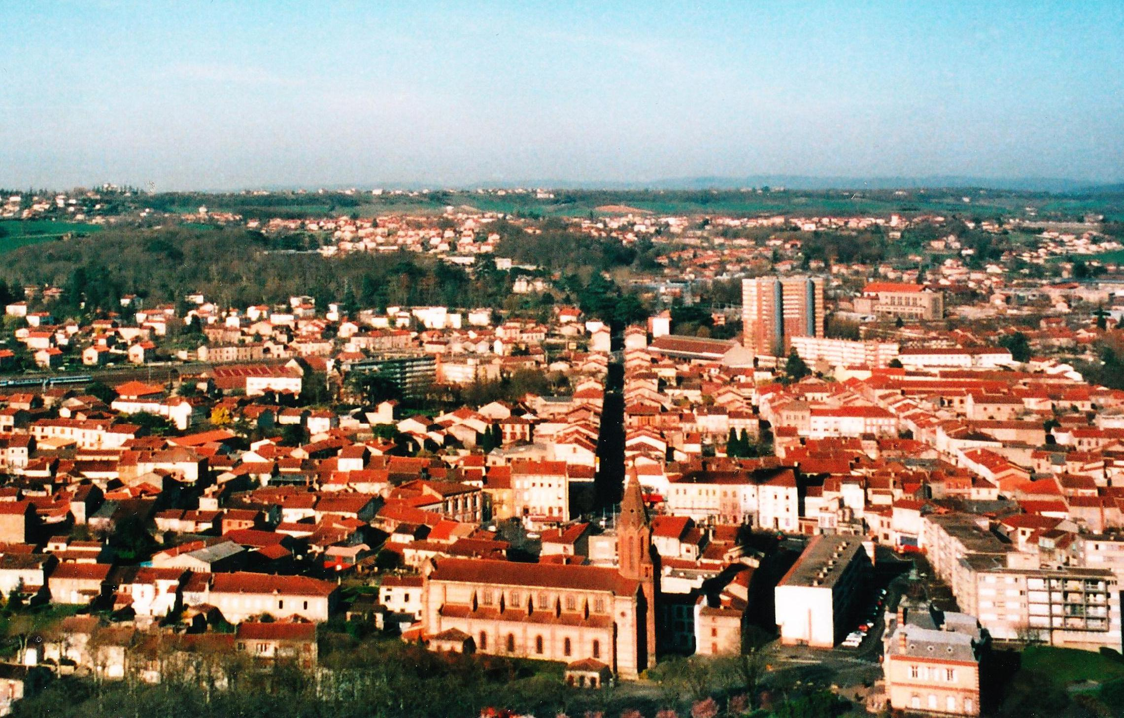 Carmaux, vue du centre-ville